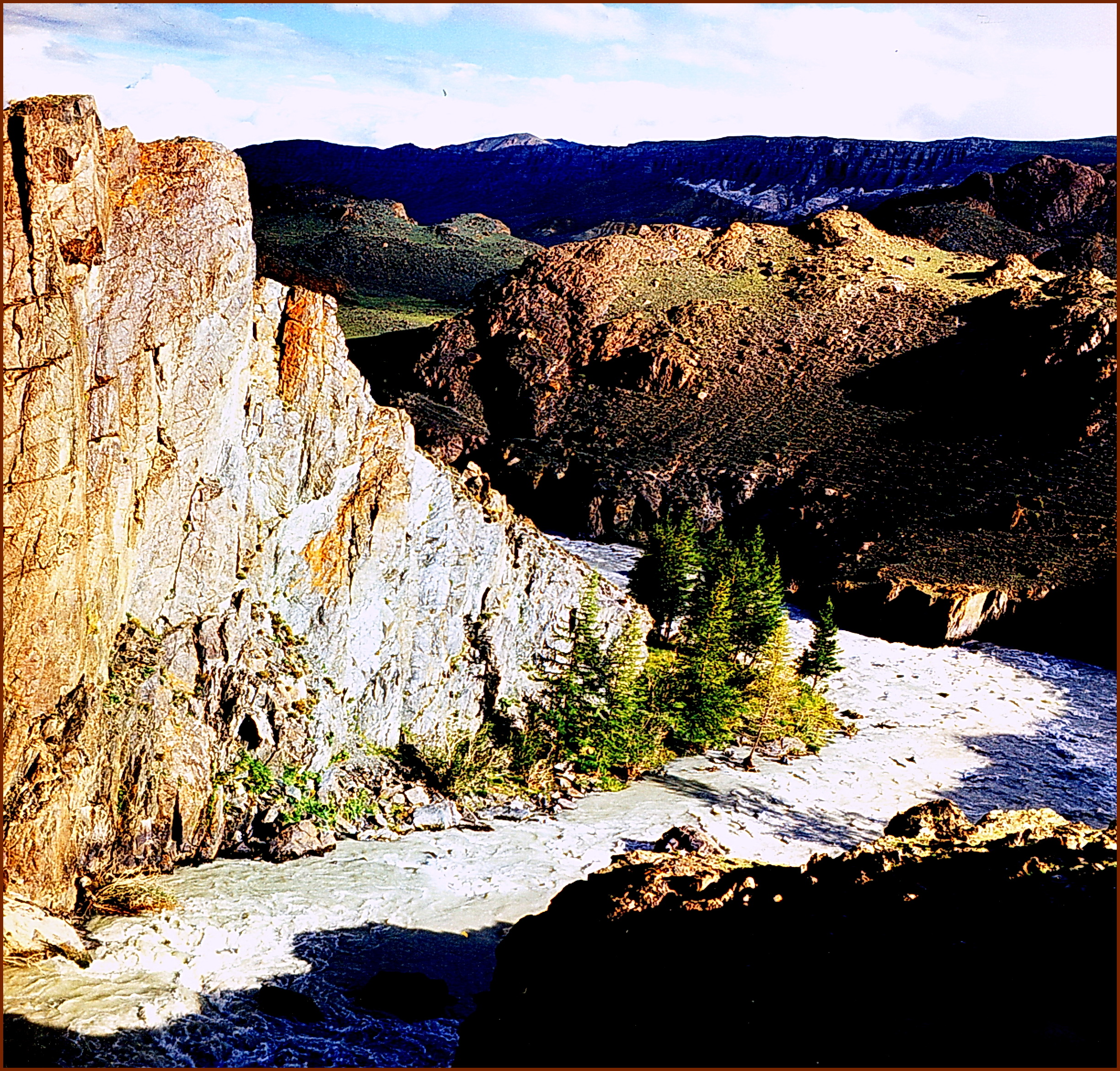 Фрагмент Чаганского скэбленда. По одному из ущельев протекает река Чаган. Алтай, август 2000.